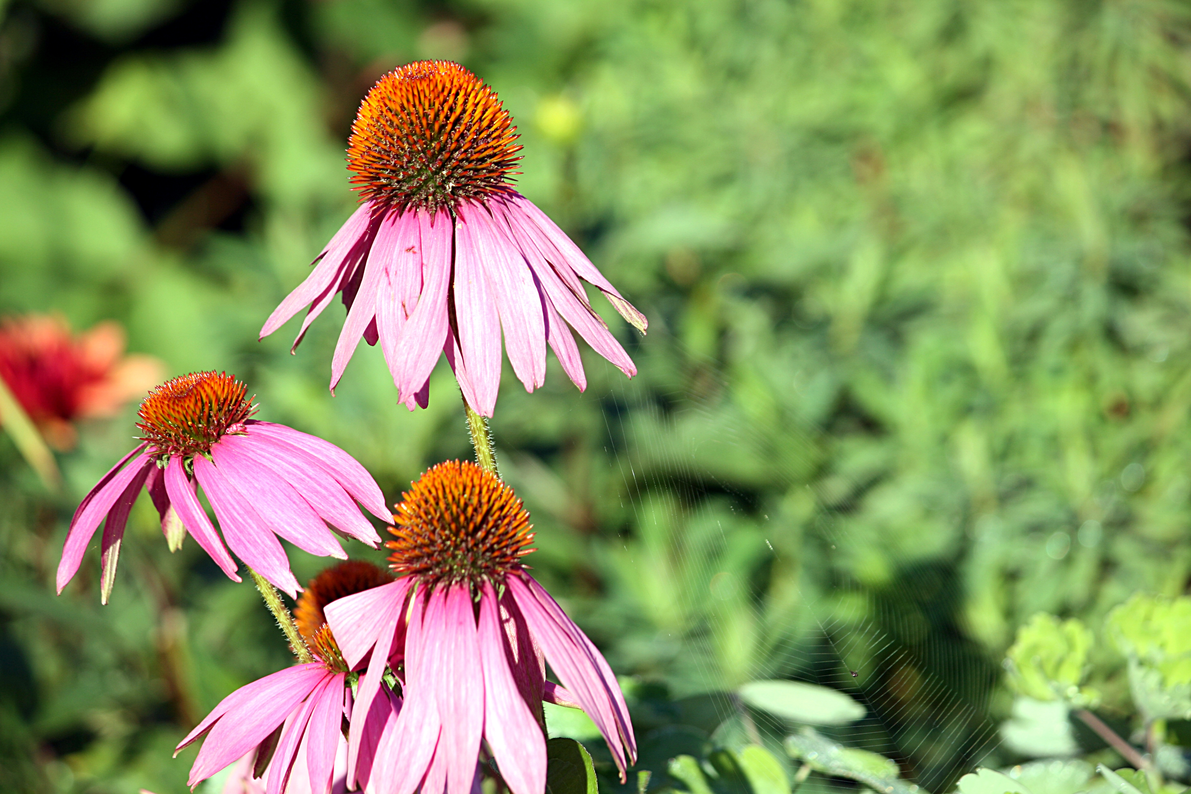 Asteraceae